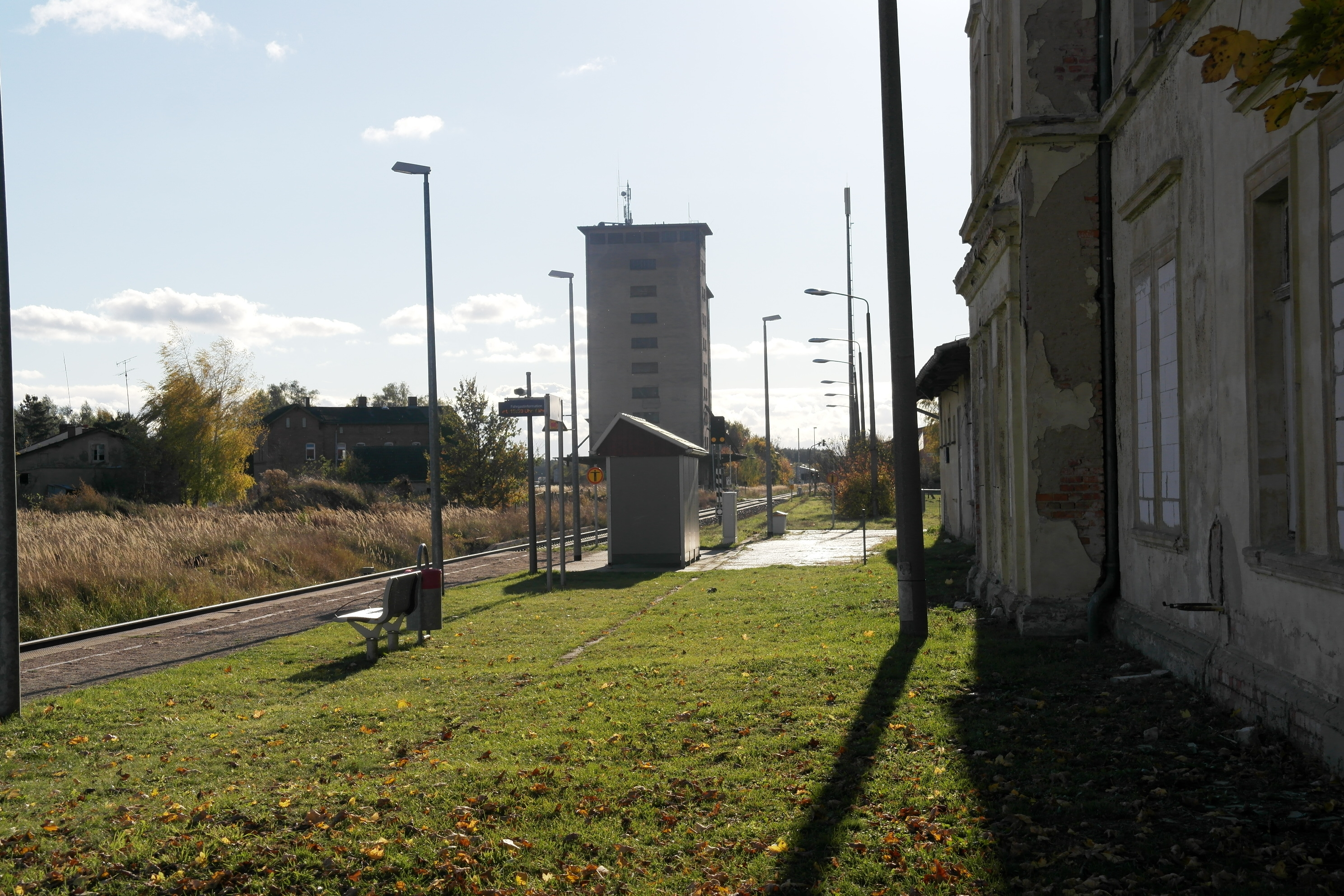 Bahnhof Casekow, Bahnsteig mit Blick auf das Getreidesilo